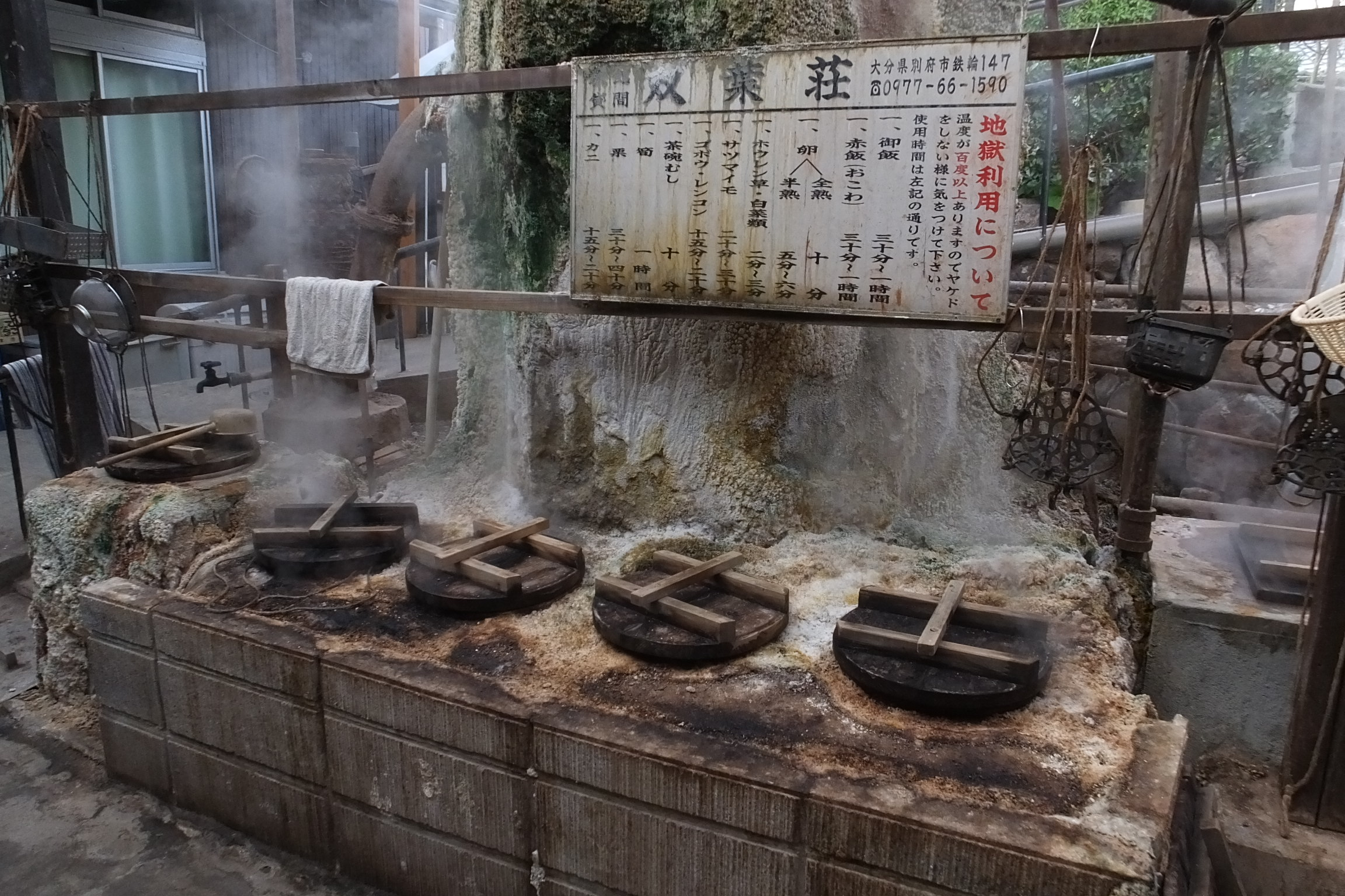 2020-02-24 Kannawa Onsen 鉄輪温泉双葉荘 地獄蒸し（源泉）